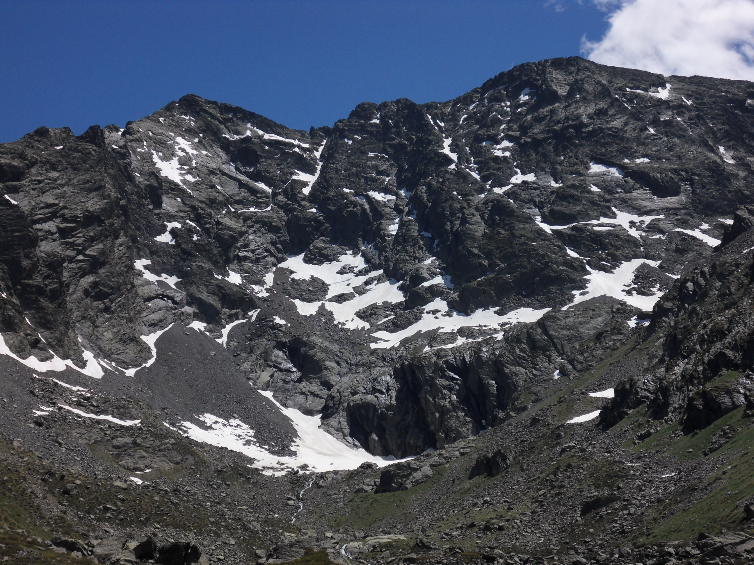 Le Pic de Médécourbe et le lac du même nom, vallée de Vicdessos, département de l'Ariège, France